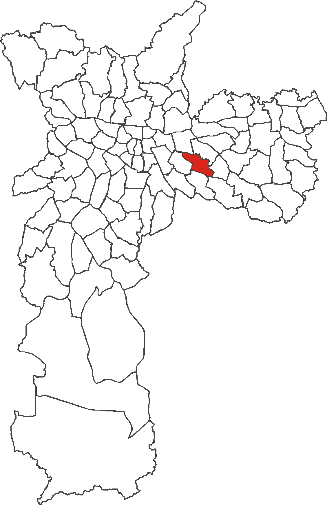 Localização do distrito de Vila Formosa no município de São Paulo.